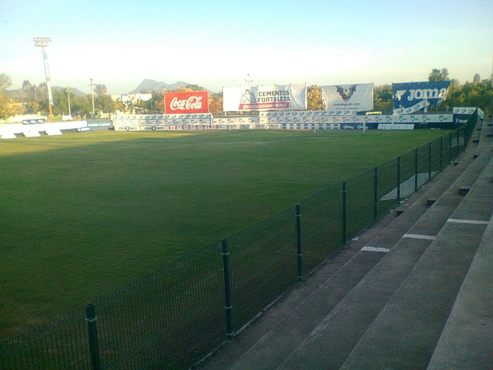 Vista de una parte del Estadio Alfredo Diaz Angulo